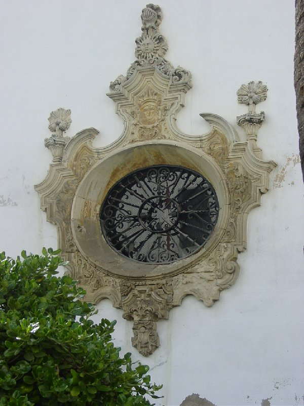 Ventana del Monasterio Dominico de Madre de Dios, Sanlúcar de Barrameda (España)